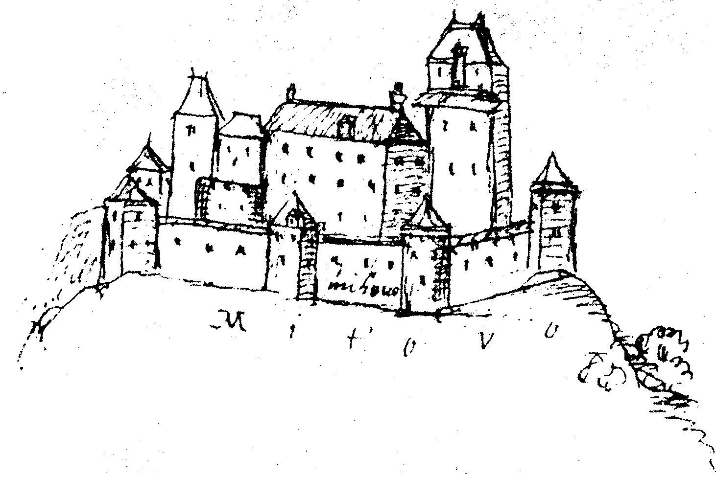 Grad mehovo, avtor: Johannes Clobucciarich med leti 1601 - 1605